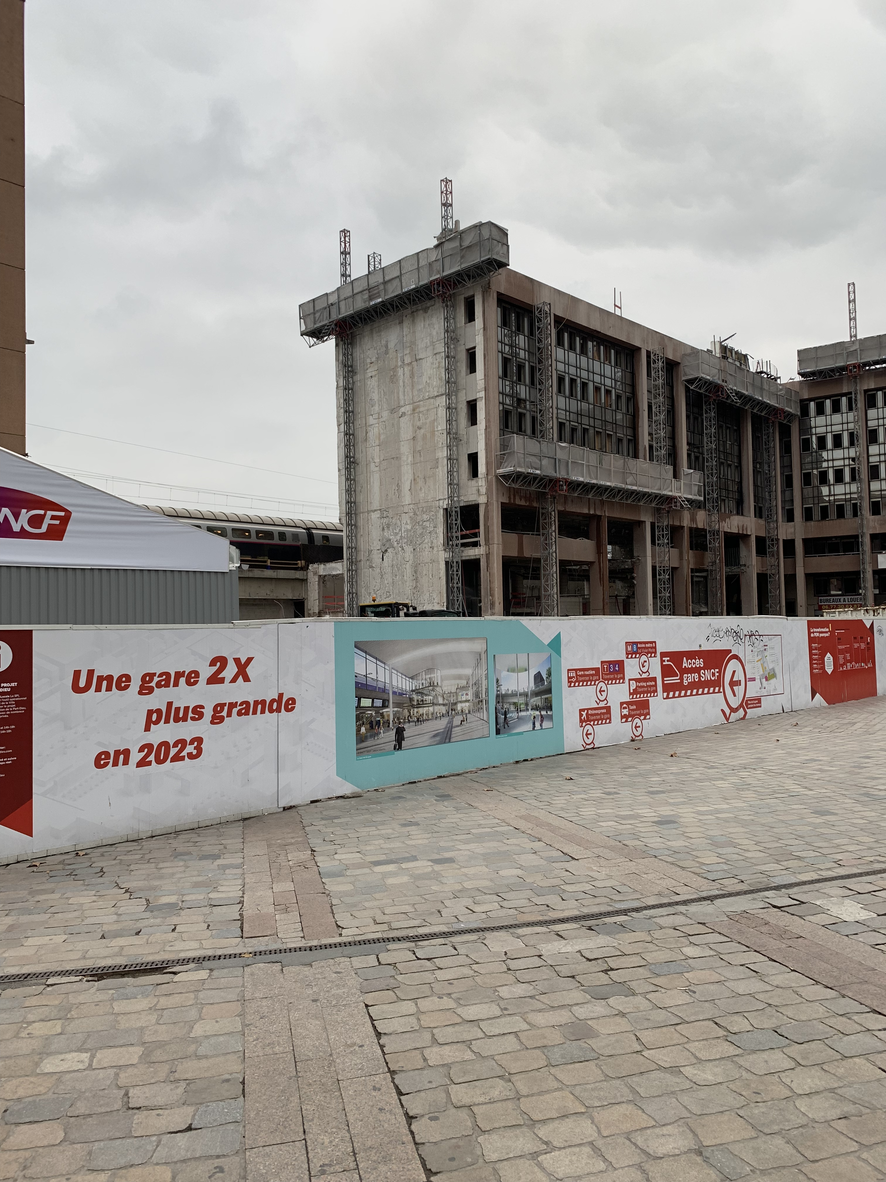 Travaux à la gare de La Part-Dieu (2019) - bâtiment latéral détruit.